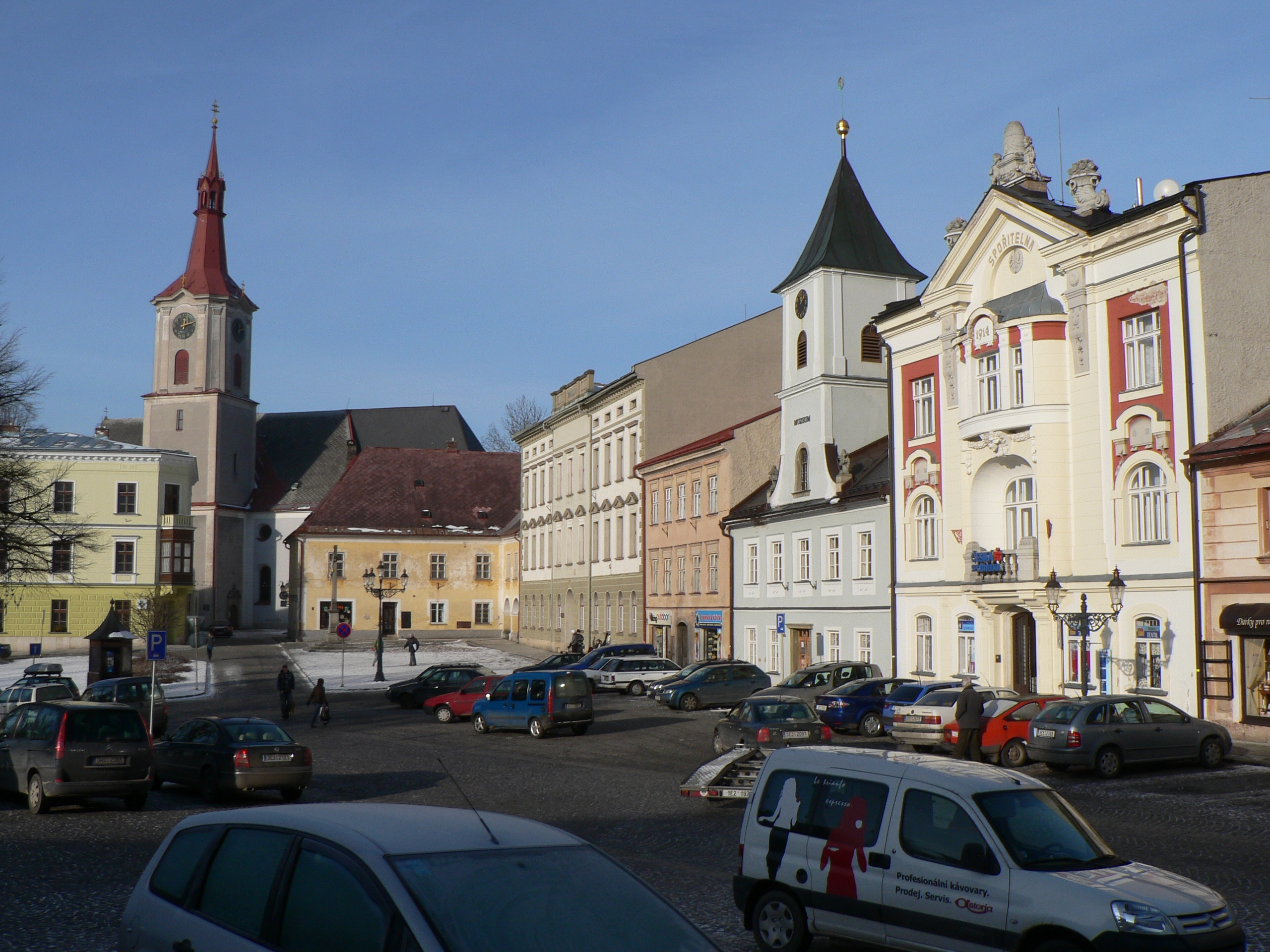 Náměstí v Králíkách